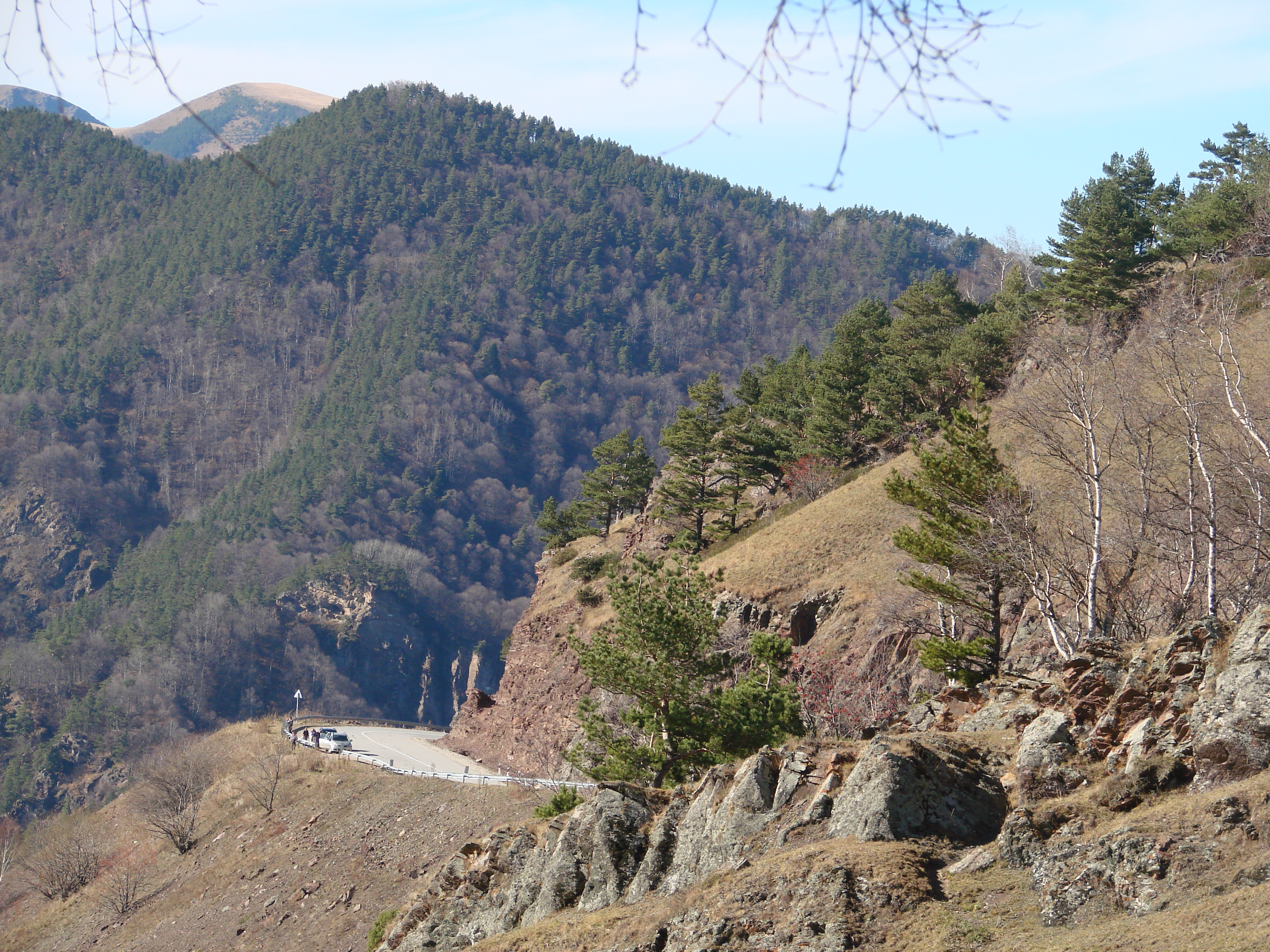 красные скалы.дорога на бта